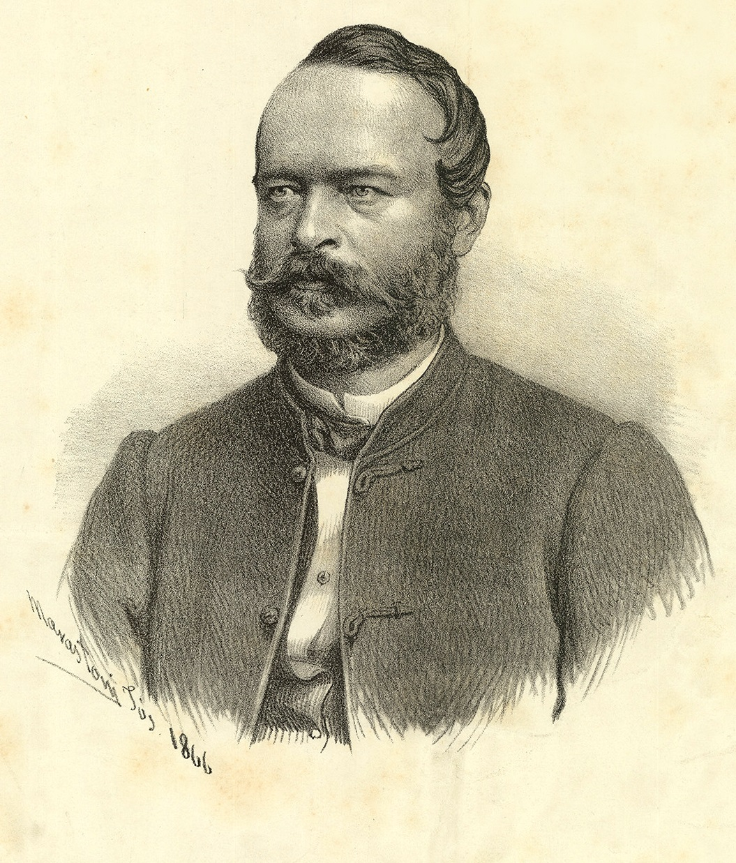 Lónyay Menyhért (1822–1884) politikus, miniszterelnök, a Magyar Tudományos Akadémia elnöke (Vasárnapi Ujság, 1871. november 26.)